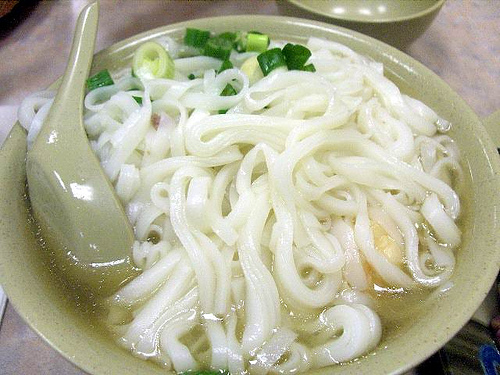 Hofan